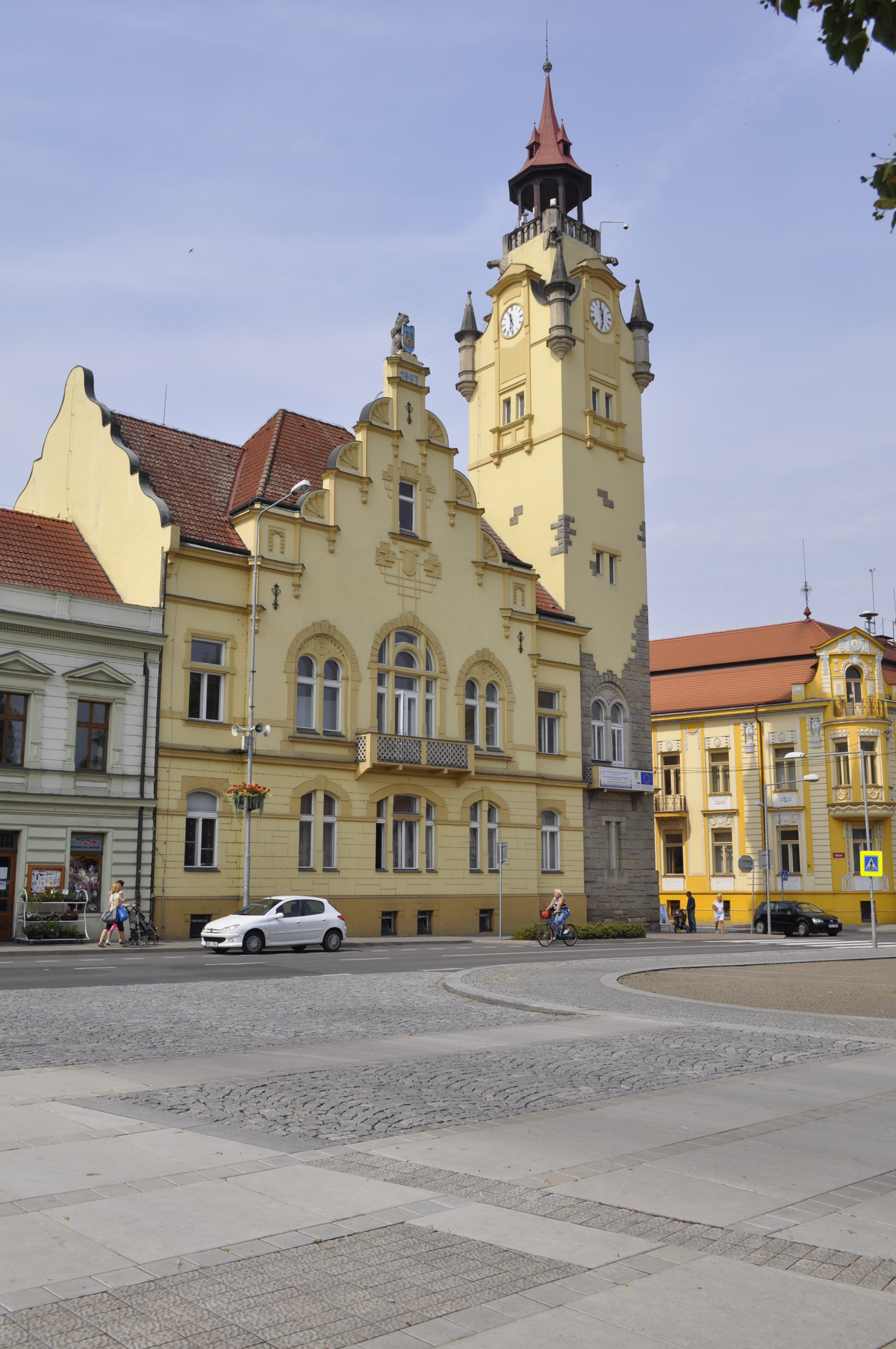 Secesní radnice